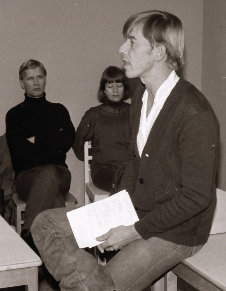 Jukka Kajava Kuusankosken työväenopiston kirjallisuuspiirin vieraana puhumassa tv- ja teatterikritiikistä syksyllä 1980